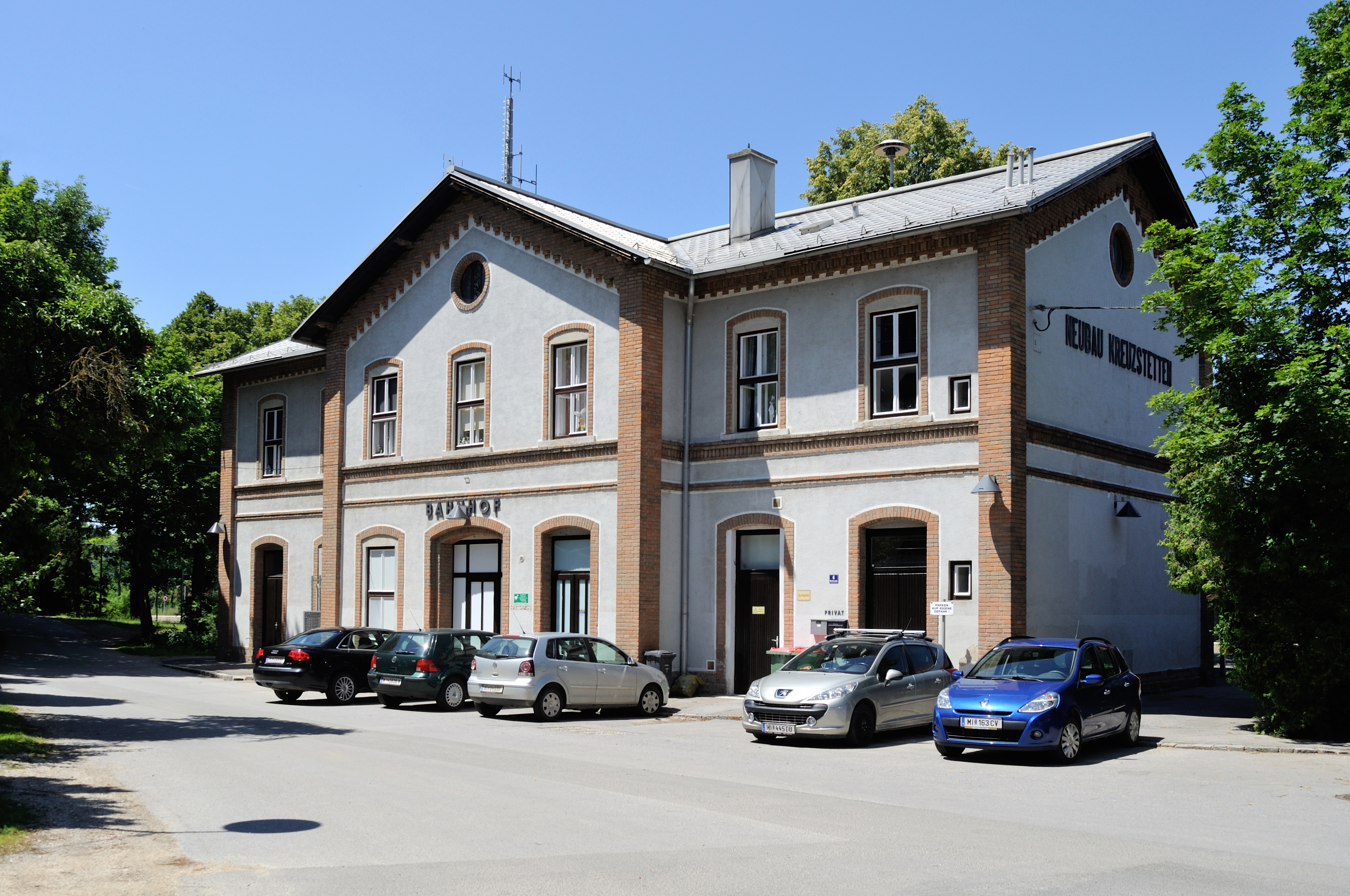 Aufnahmegebäude des Bhf. Neubau-Kreustetten